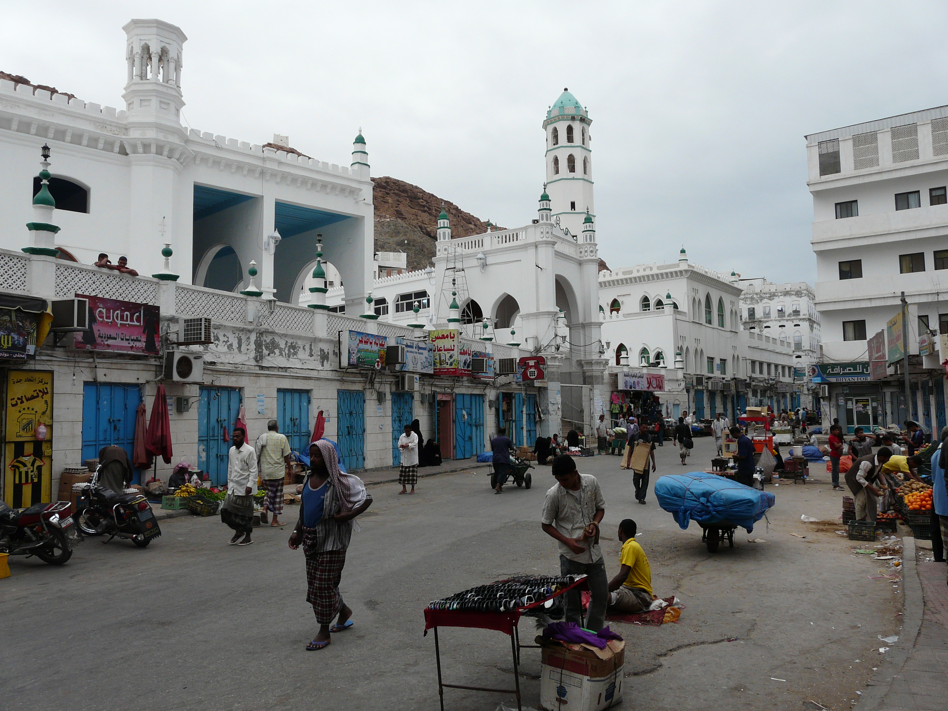 Йемен. Эль-Мукалла. Старый Городю. Мечеть с подворьем и торговая площадь возле неё. 08 фев 2010